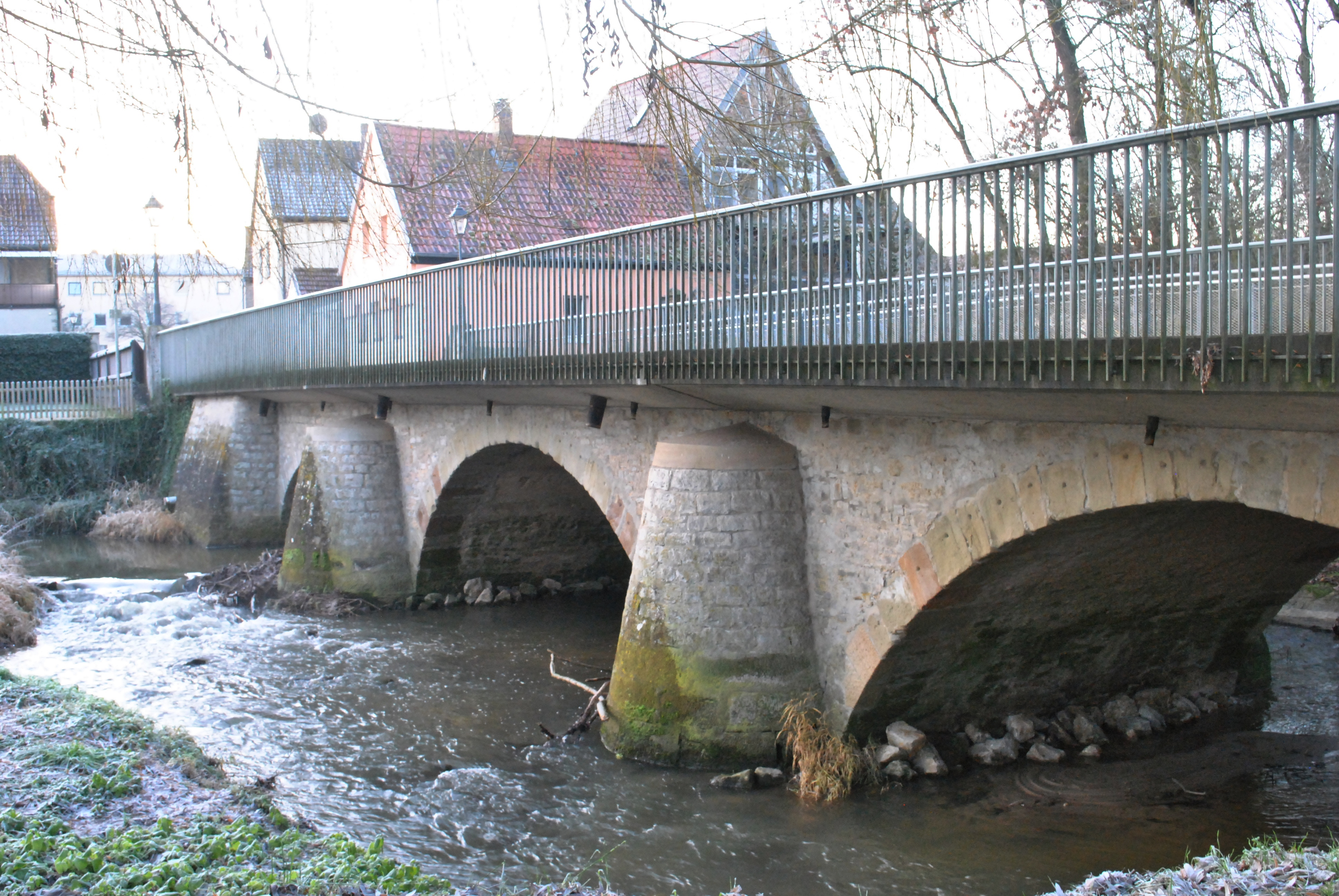 Brücke über die Schwarzach, Dreibogig aus Sandsteinquadern, um 1680, erneuert 1989